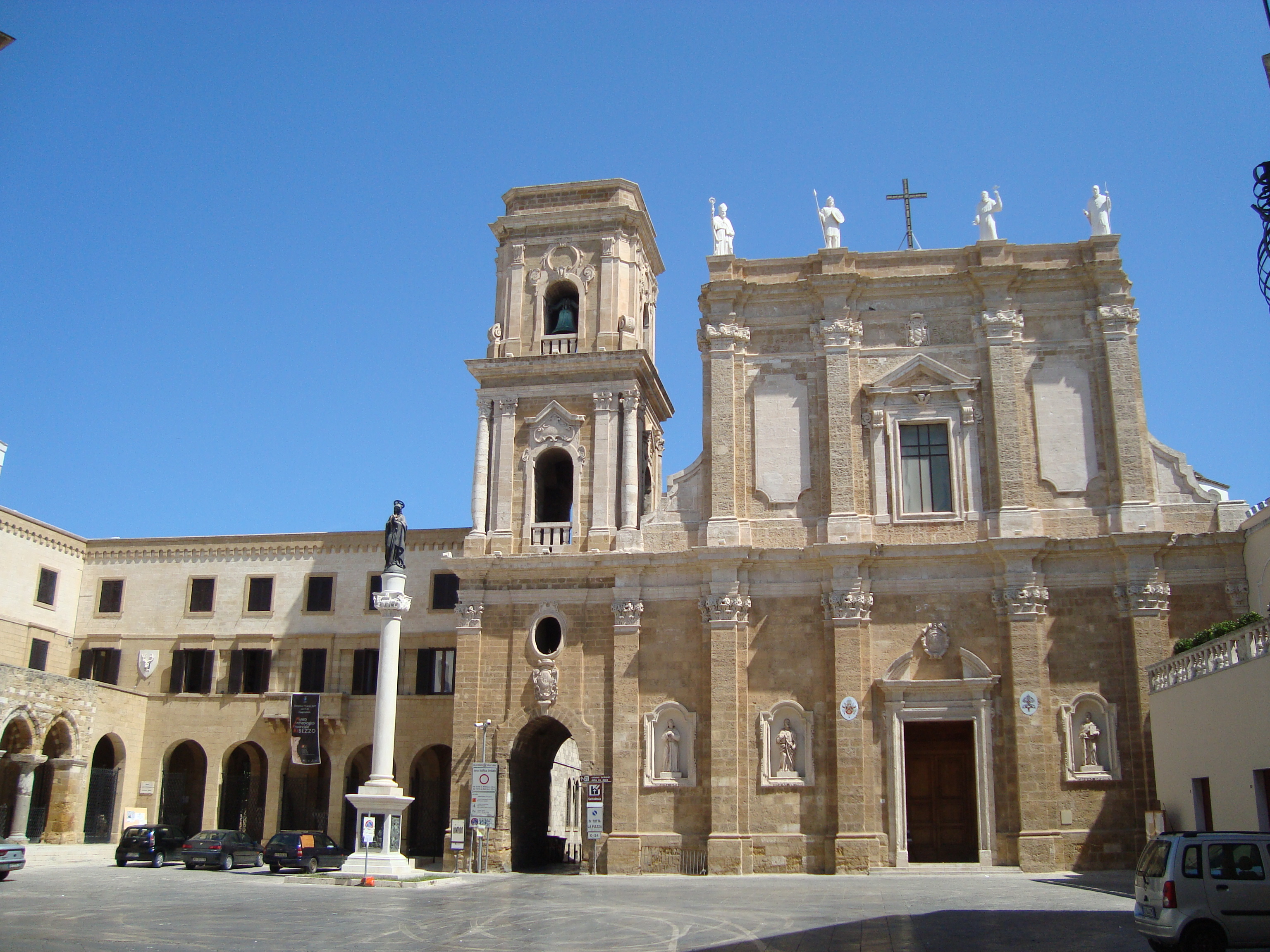 La cathédrale de Brindisi sur la Piazza del Duomo